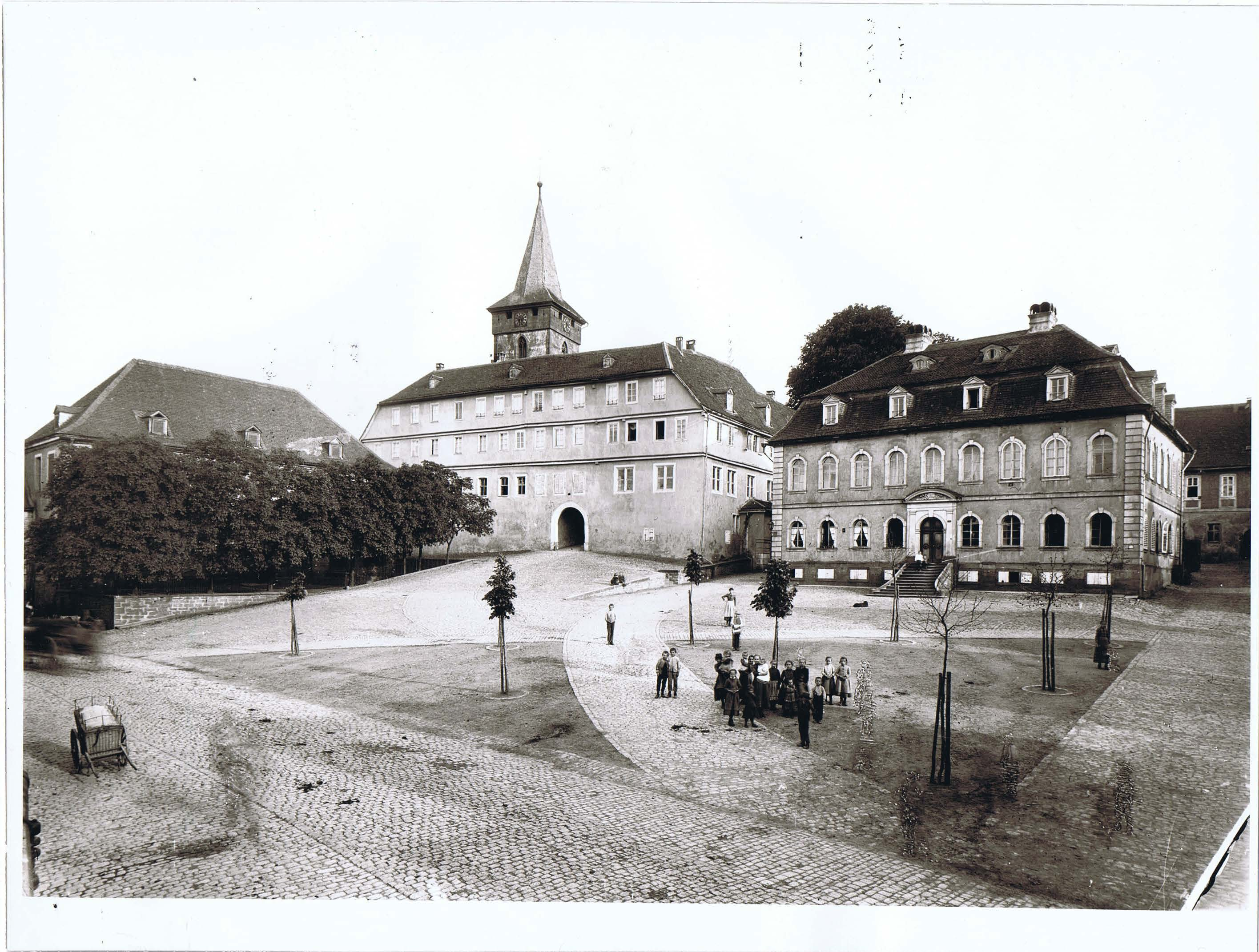 Die Aufnahme zeigt den Schlossplatz mit Altem und Neuen Schluss in Bad König um die Zeit von 1900